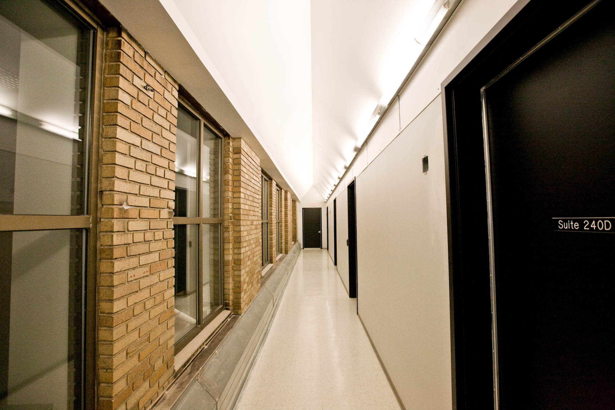 Suite Hallway